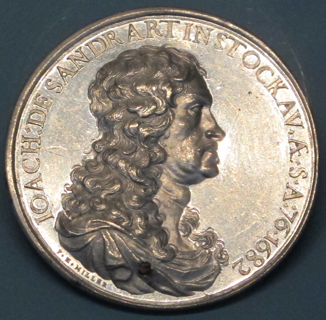 Medaglia di Joachim von Sandrart (1606-1688), Norimberga 1682